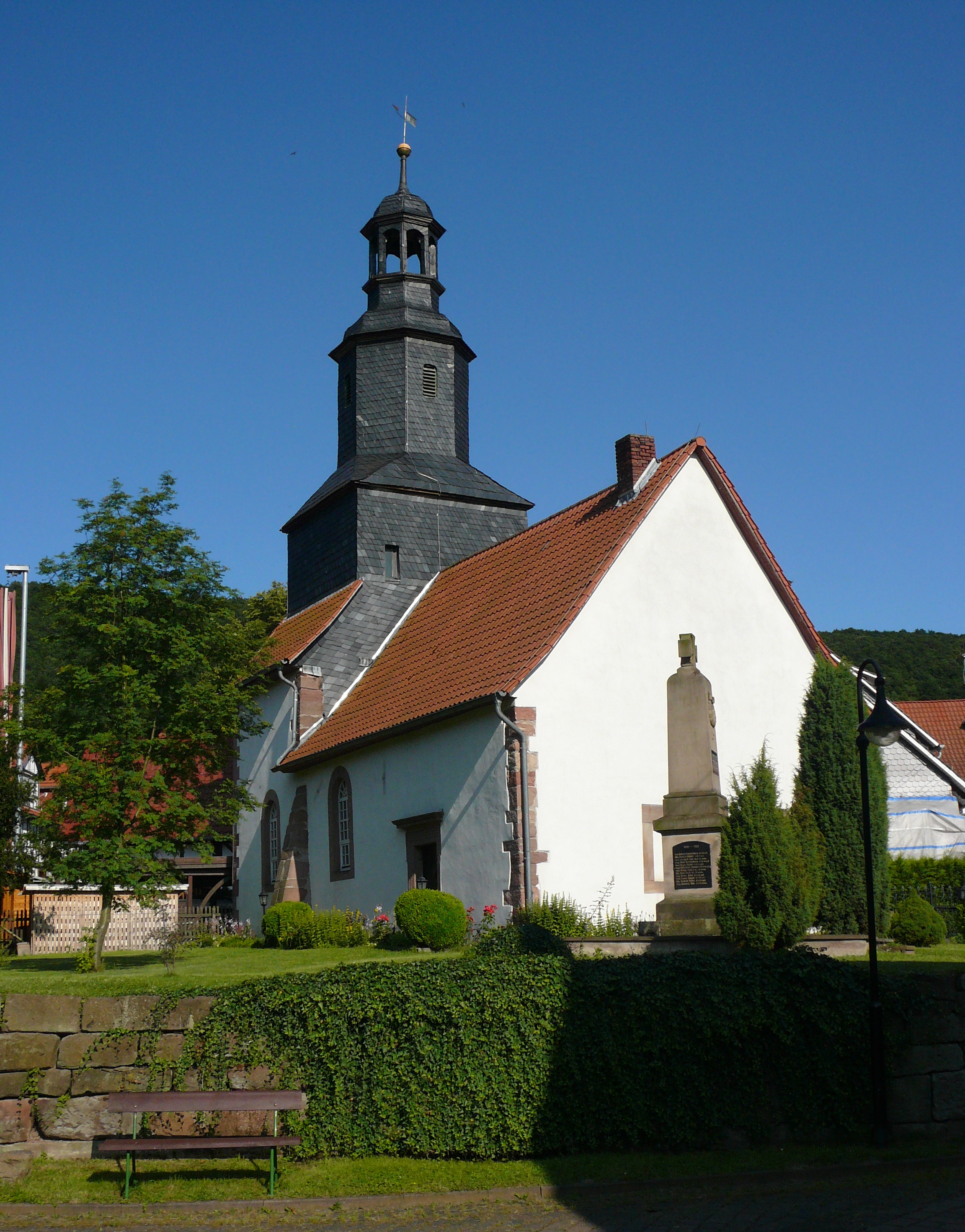 Evangelische Kirche in Lindewerra, ursprünglich der Maria geweiht. Erbaut 1738, Turmaufsatz 1789.